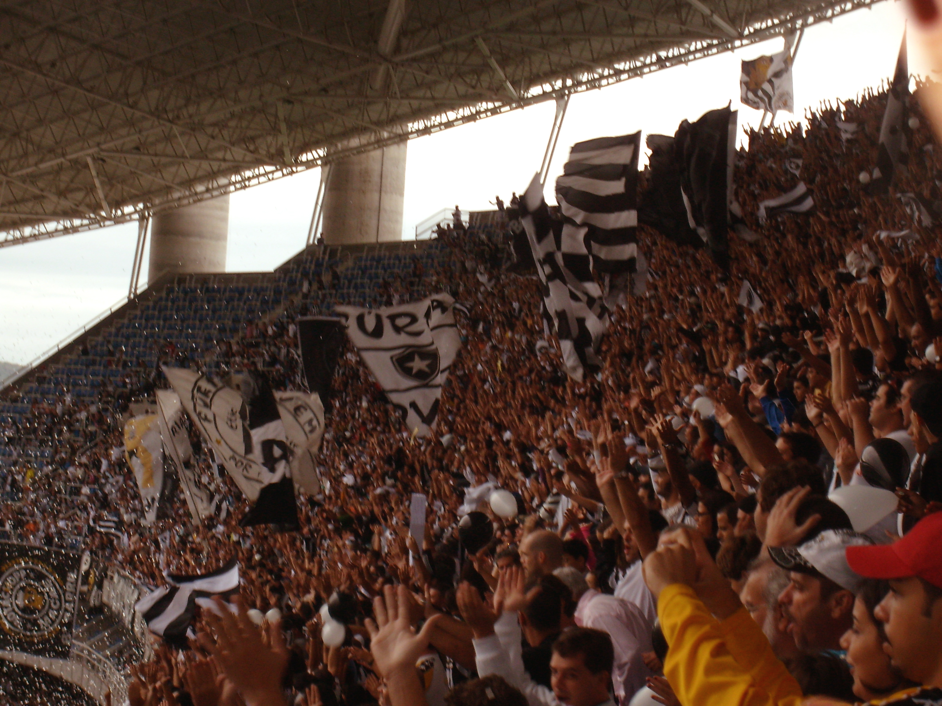 Torcida do Botafogo no Engenhão em 10 de agosto de 2008, em partida vencida pelo clube por 1 a 0 sobre o Palmeiras.